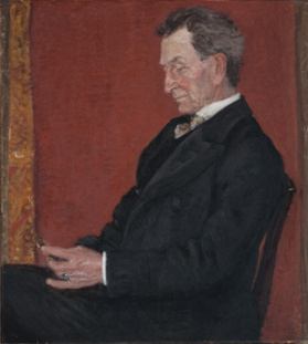 Miloš Jiránek, Portrét Augusta Švagrovského